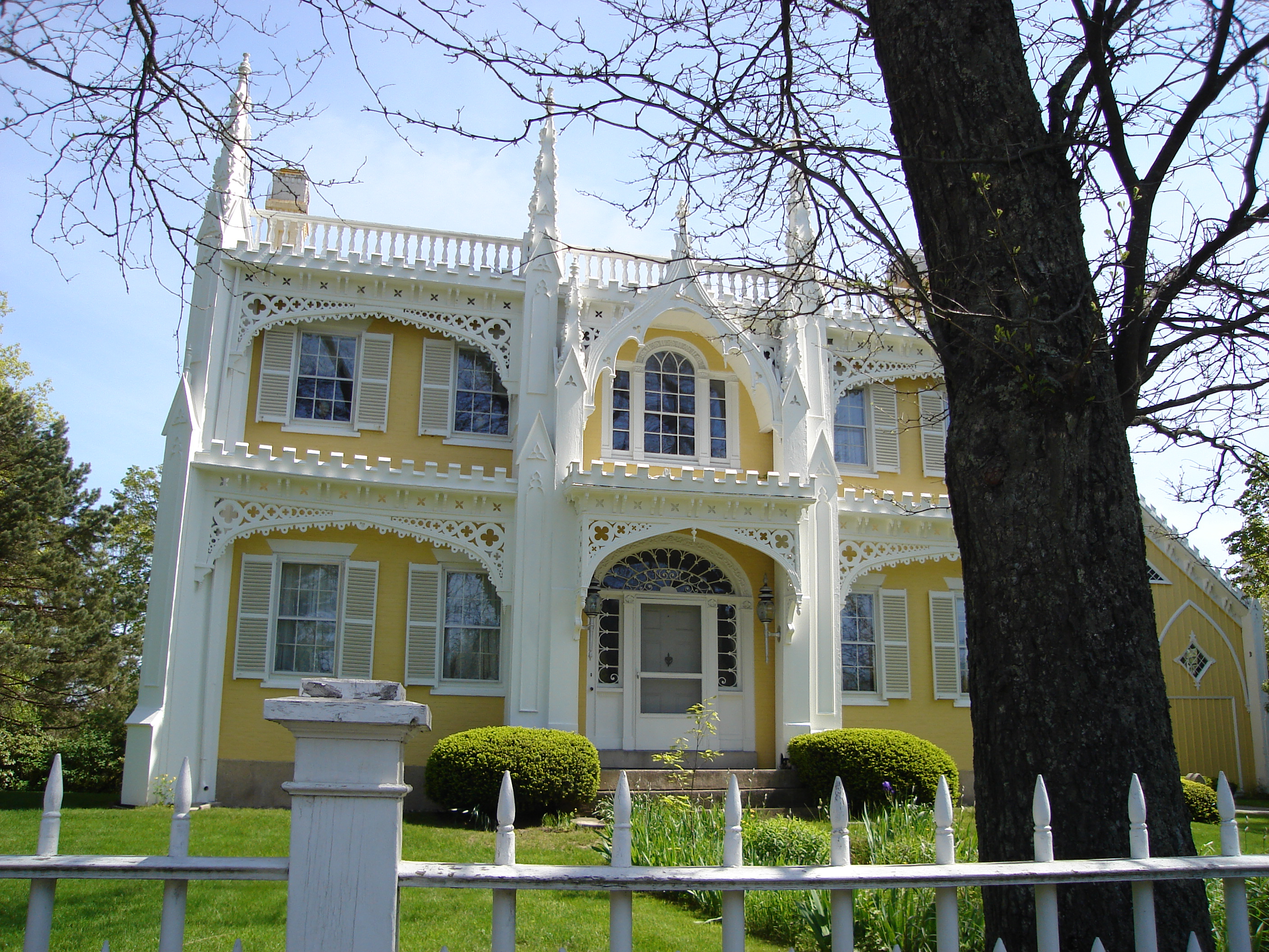 Wedding Cake House, Kennebunk, Maine